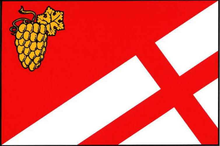 Vinařice, okres Mladá Boleslav, vlajka